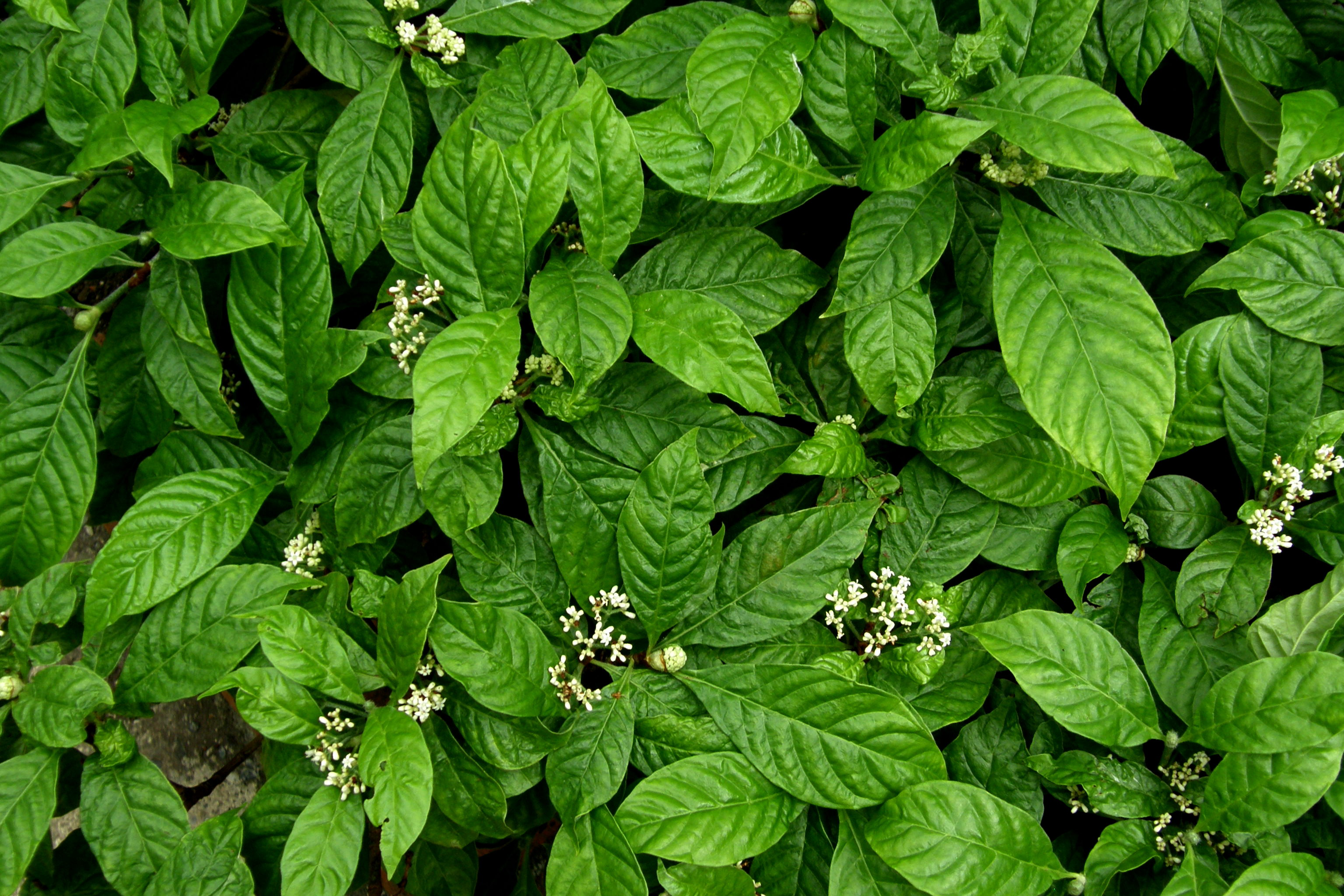 Psychotria nervosa Sw.( Psycotre nerveuse ) dans la serre du Botanischer Garten de Berlin-Dahlem